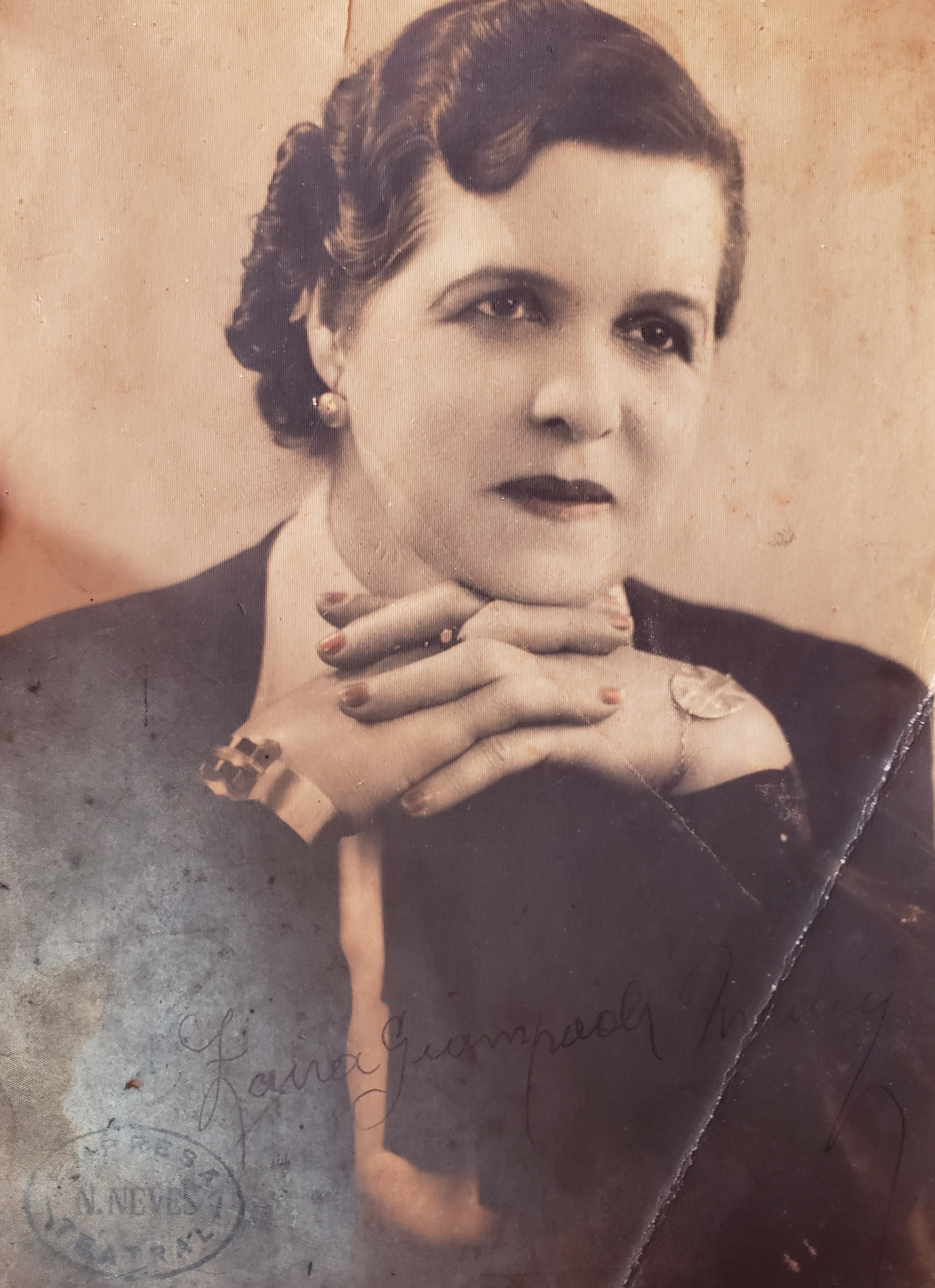 Atriz e proprietária da Companhia de Teatro Zaira Medici